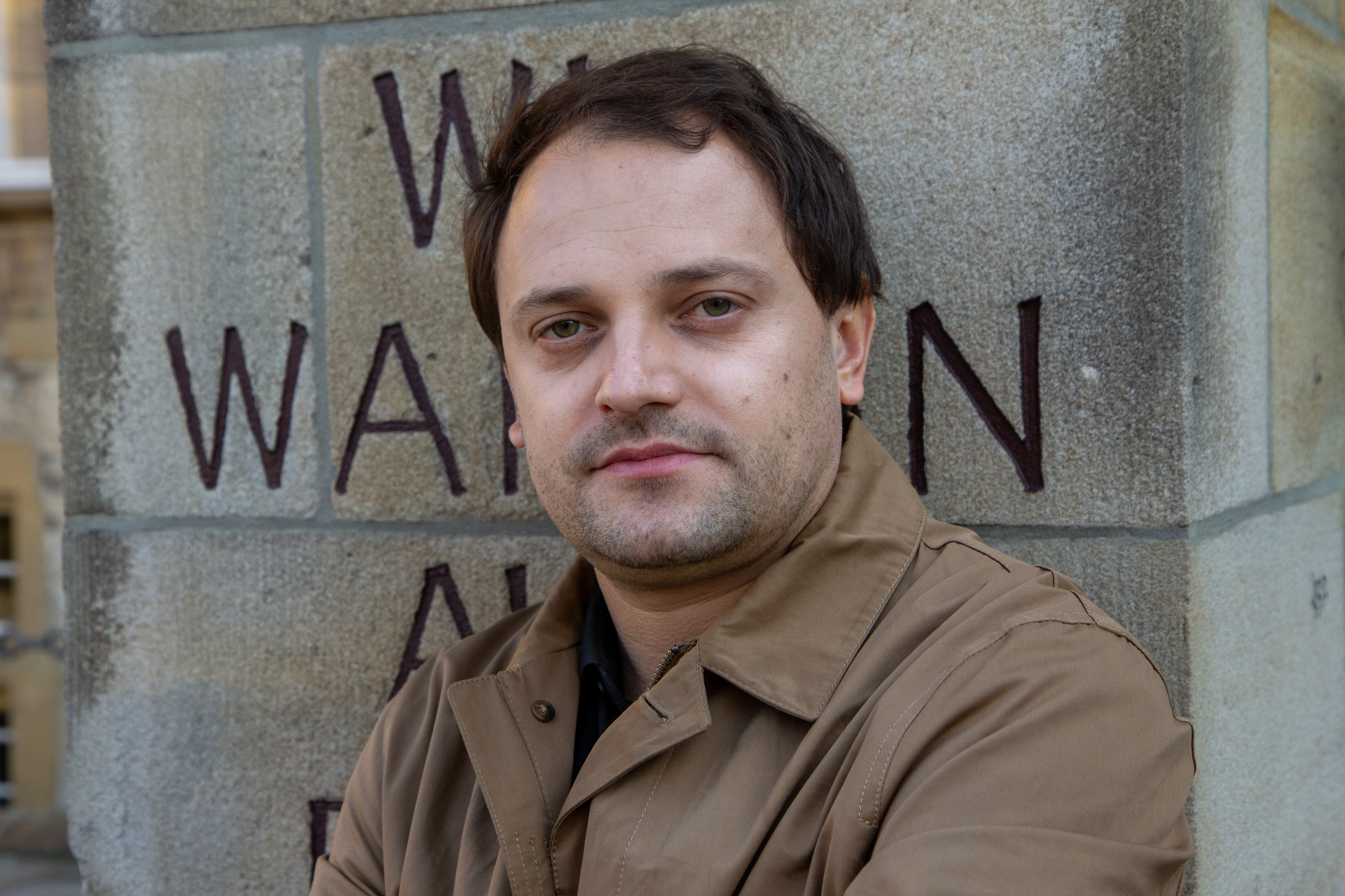 Pressetermin am Set "Wilsberg" am Alten Rathaus in Bielefeld am 15. Oktober 2018. Schauspieler: Stefan Haschke